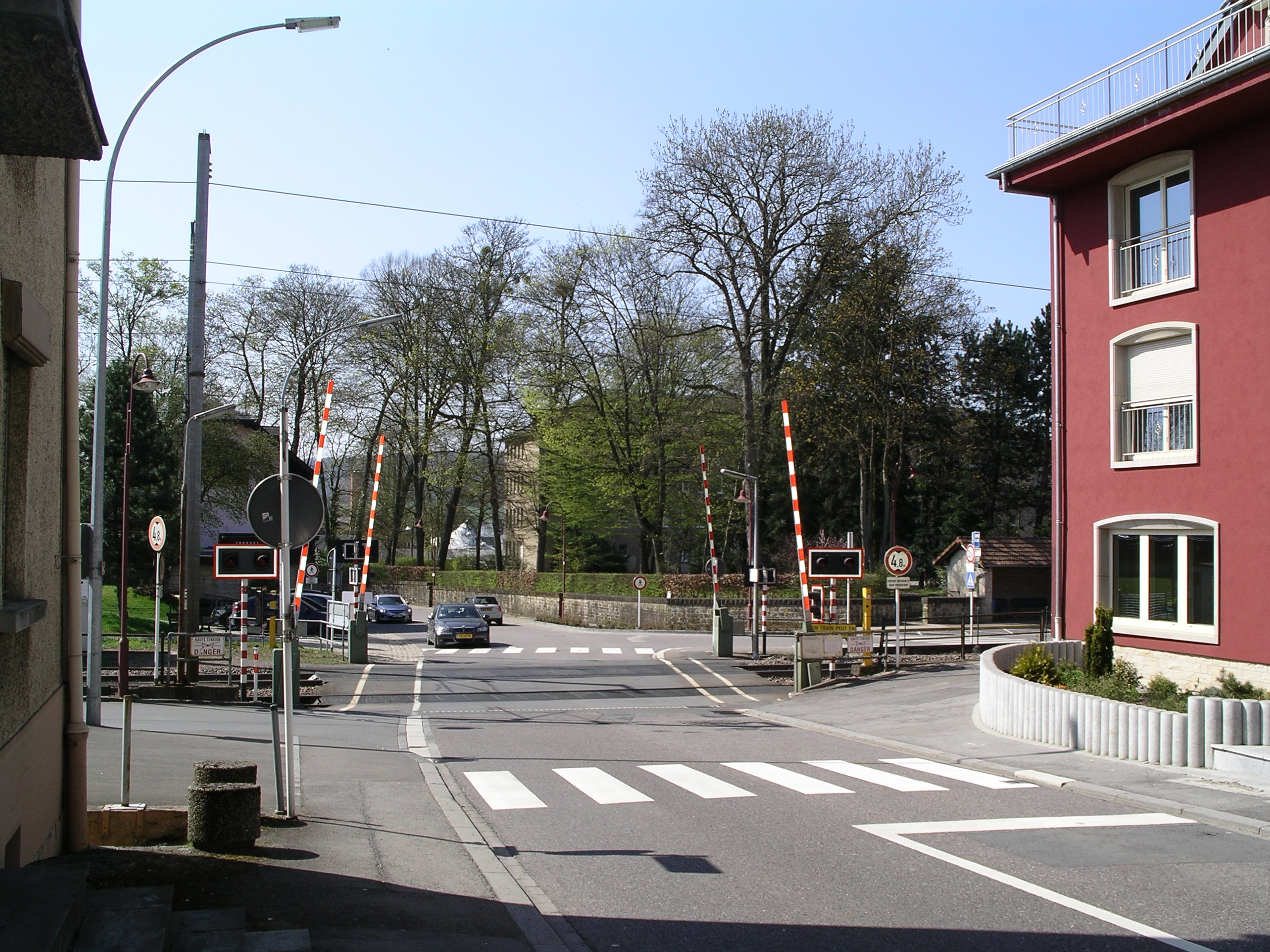 Bahnübergang zwischen Walferdingen und Helmsingen (Walferdange / Helmsange), Luxemburg